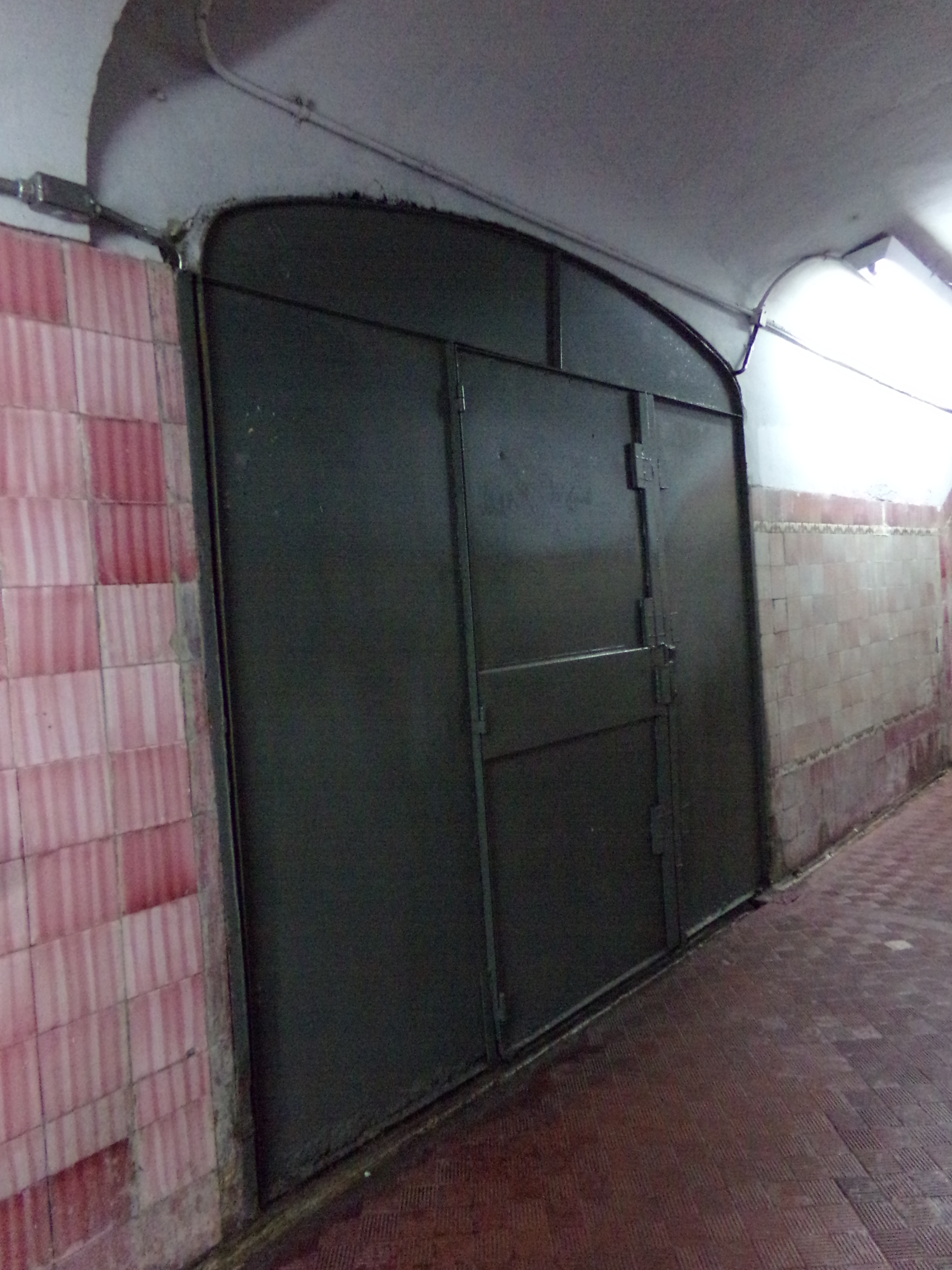 Entrada al taller San José (San José Vieja) desde la estación San José habilitada de la línea E (andén a Bolívar).